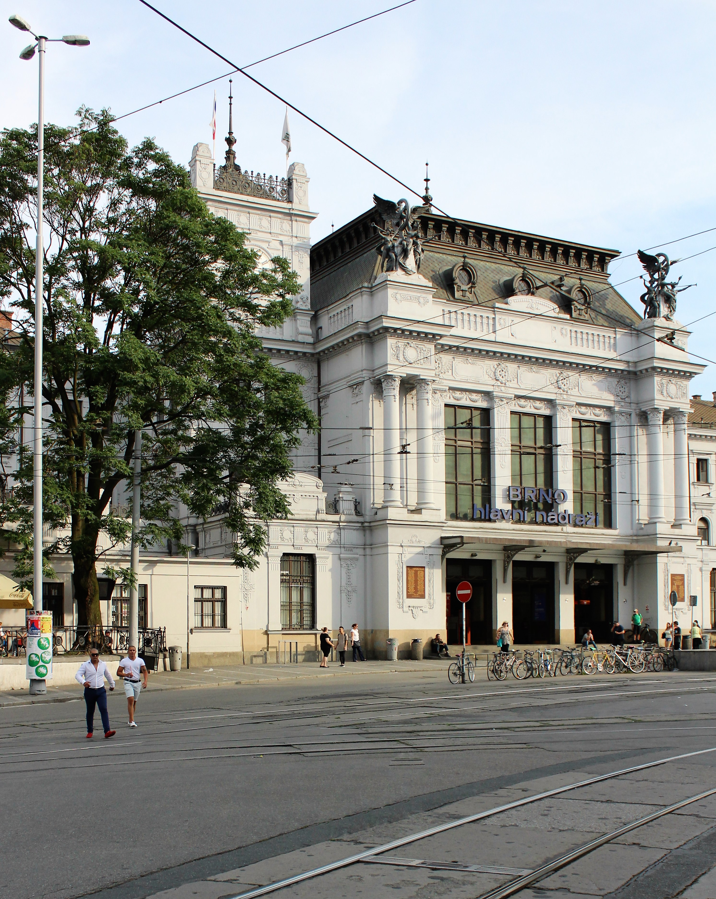 Central station Brno